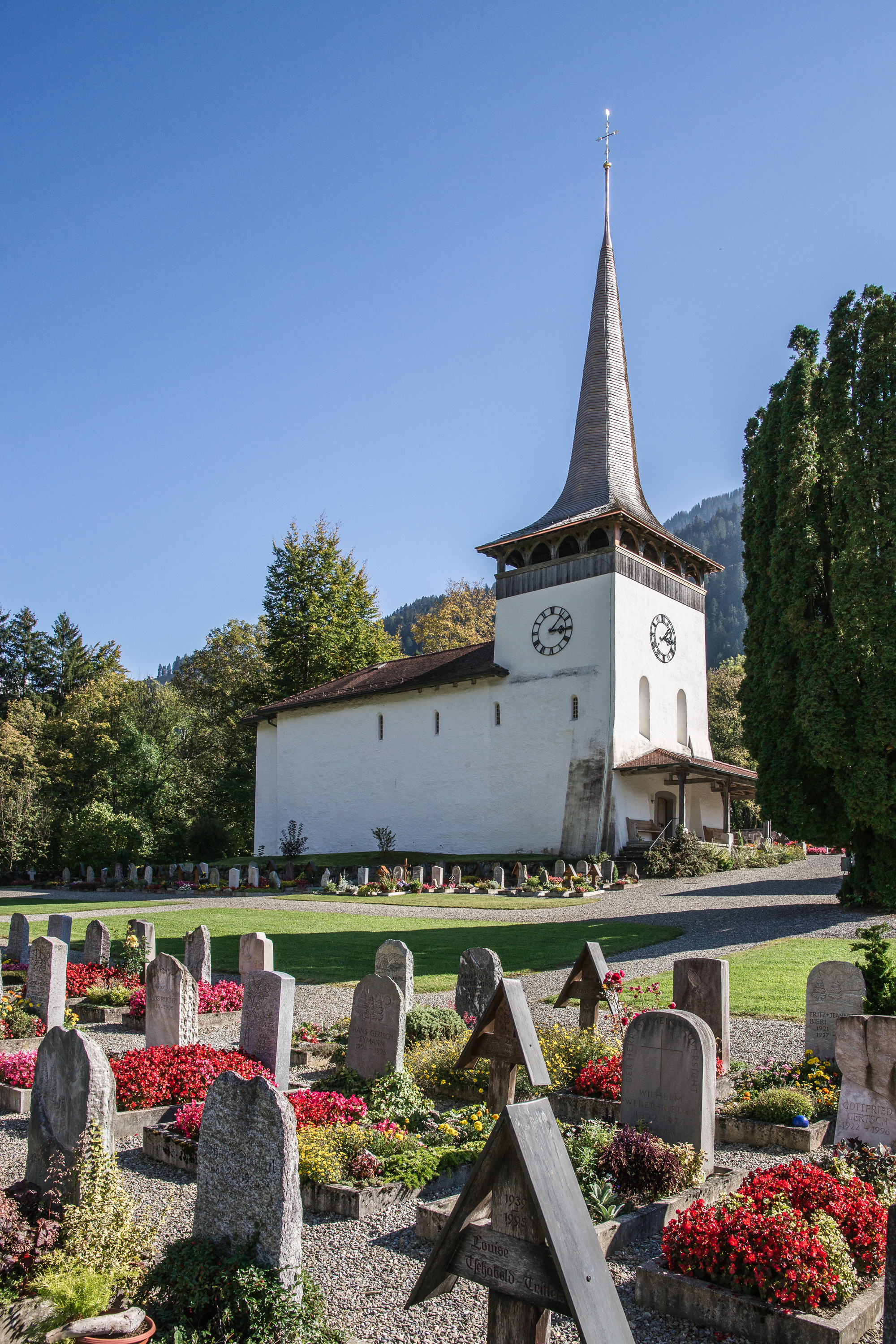 Reformierte Kirche auf der sog. Schattseite des Simmentales mit Friedhof